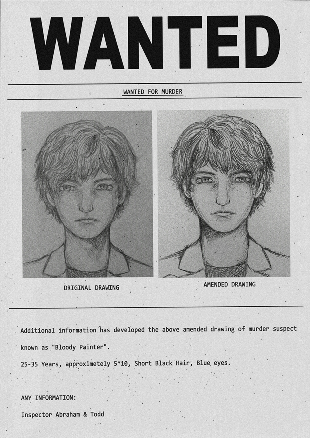 通緝令海報